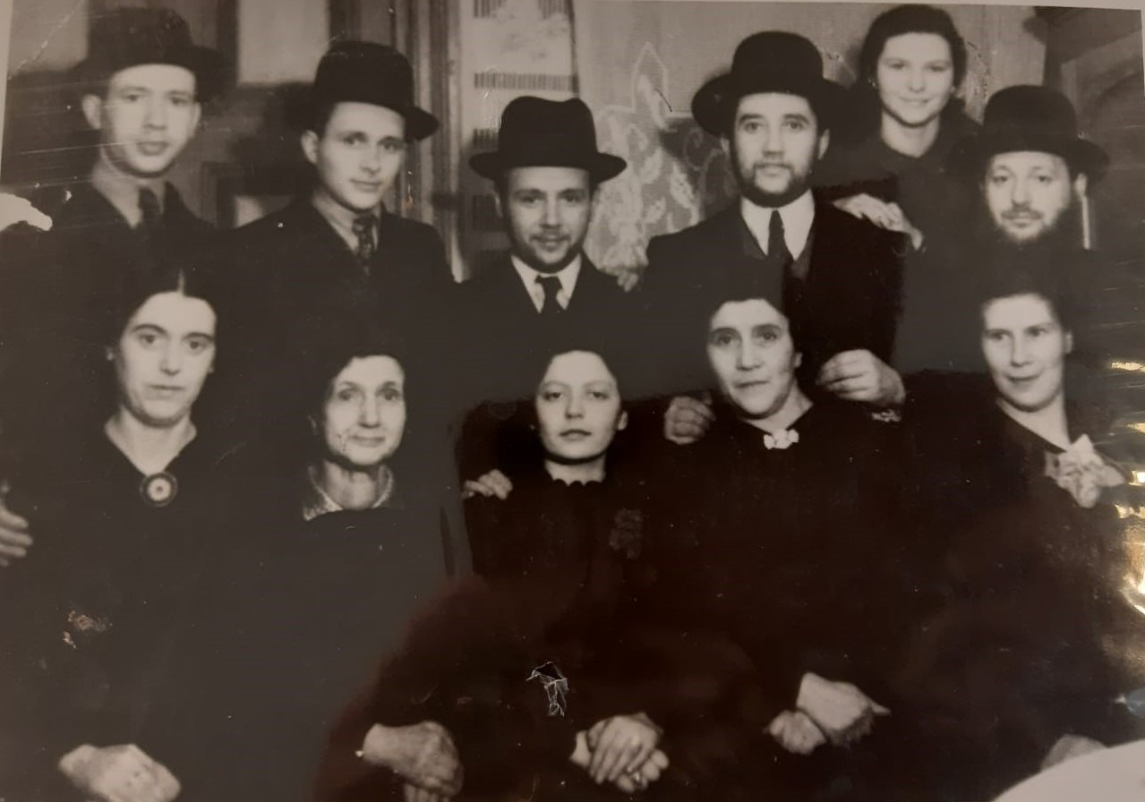 משפחה